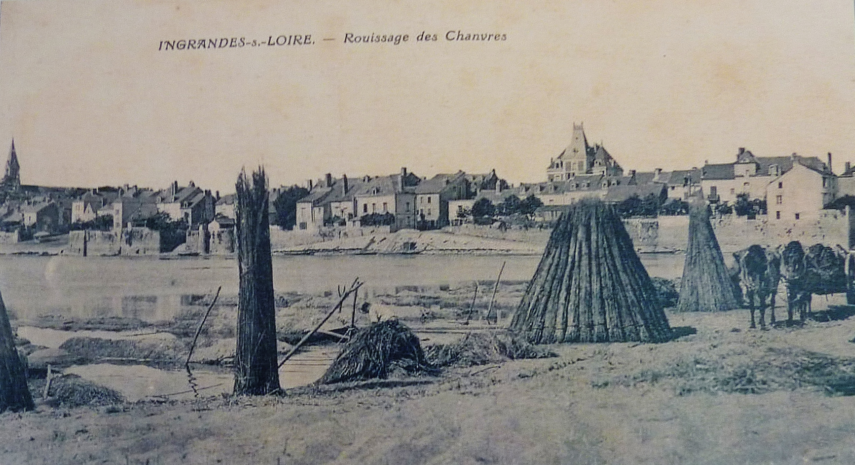 Le rouissage du chanvre à Ingrandes-sur-Loire au début du XXe siècle (carte postale)